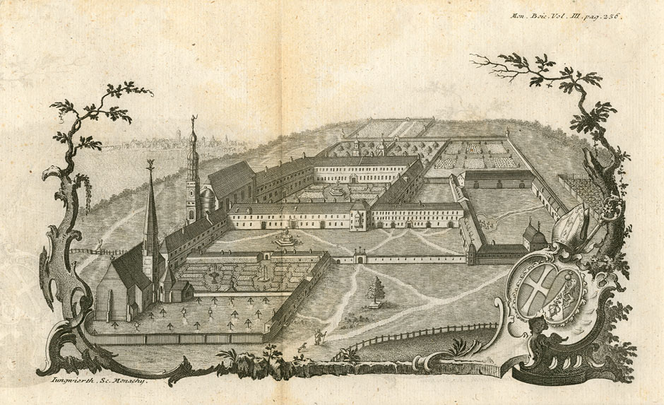 Kloster Ranshofen bei Braunau am Inn Kupferstich von Franz Xaver Jungwirth aus : “Monumenta Boica” (Vol. III), 1764. Darstellung ca. 14 × 23 cm – Blattgröße : 20 × 26 cm